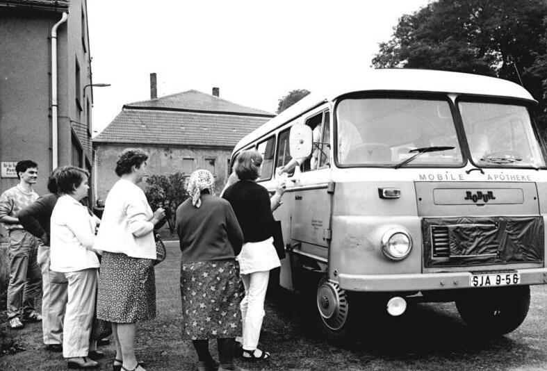 Pomßen, mobile Apotheke Zum Beitrag: Mit der Apotheke übers Land - 15 Jahre Arzneimittelbus im Kreis Grimma ADN-ZB Sereeter - 15.9.1988 - ha. Seit 15 Jahren ist er im Kreis Grimma bei den Einwohners der Landgemeinden zum festen Begriff geworden: Der rollende Arzneimittelbus, offiziell "Mobile Apotheke" genannt. Wie hier in der Gemeinde Pomßen wird der Apothekenbus, der dreimal wöchentlich feste Routen nach Fahrplan befährt, meist schon erwartet. (Hierzu gehören 1988-0915-300 - 302 N)